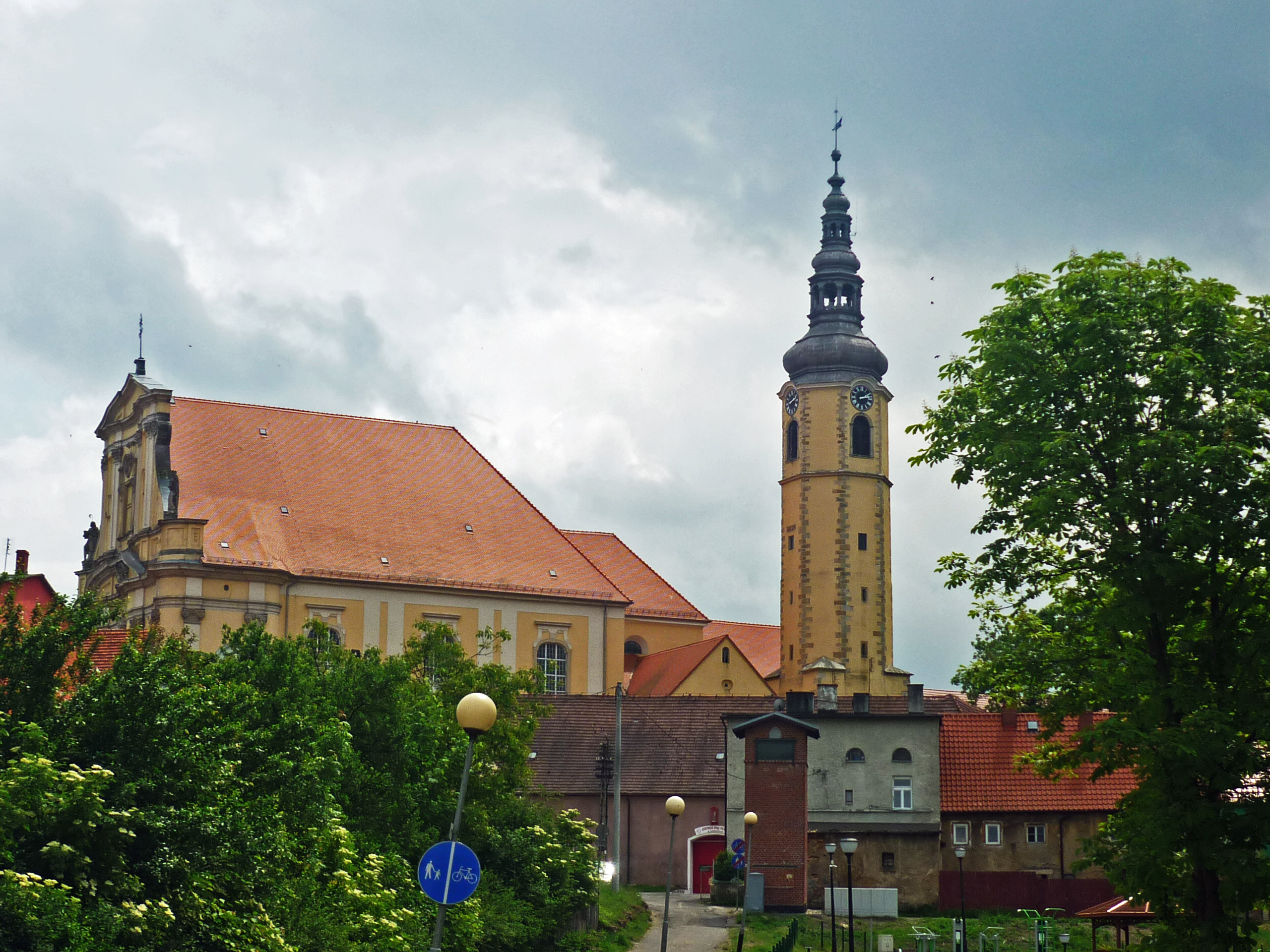 Die St. Maternuskirche in Liebenthal (Lubomierz) in Niederschlesien